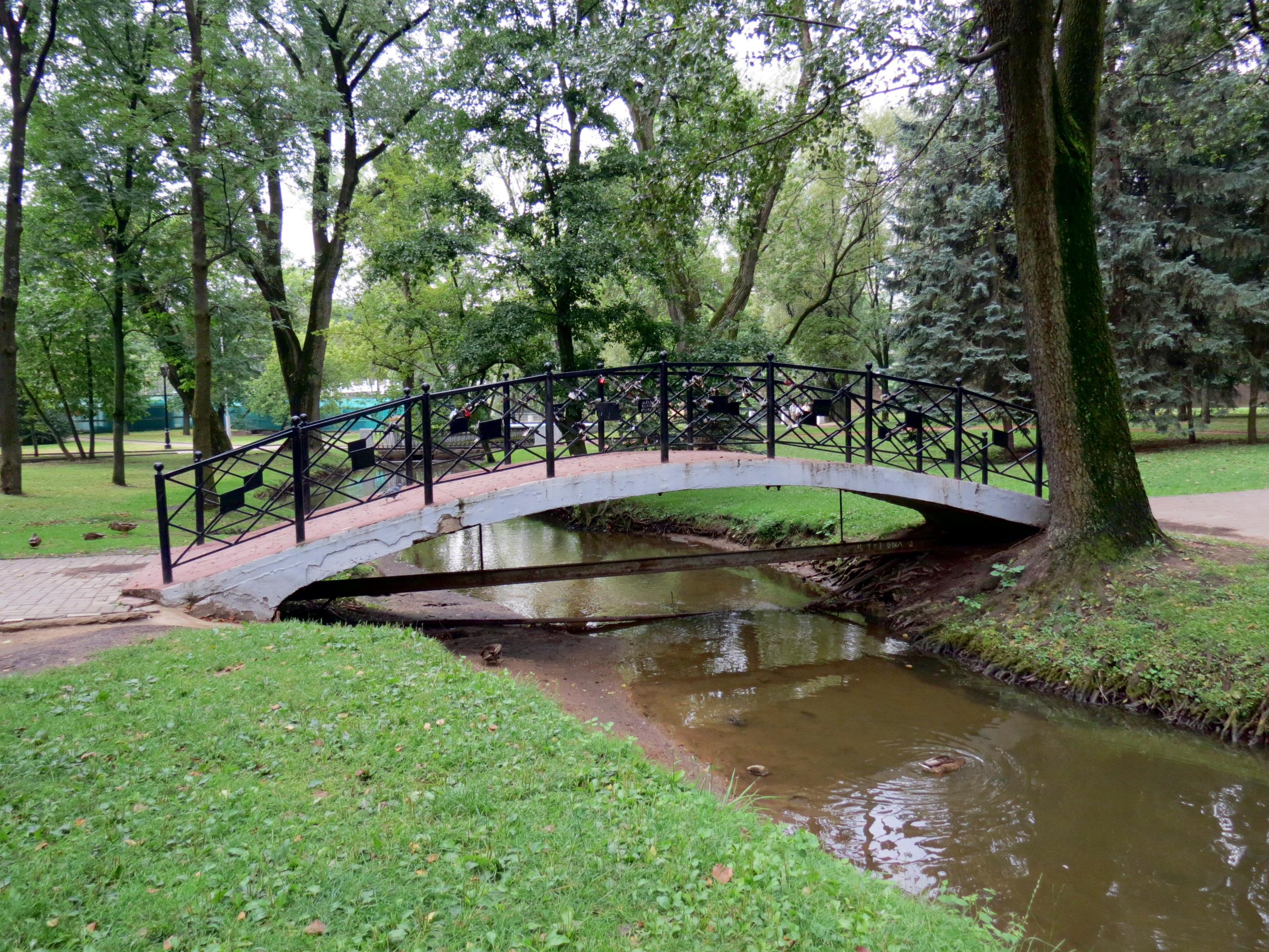 Центральный парк им. Горького